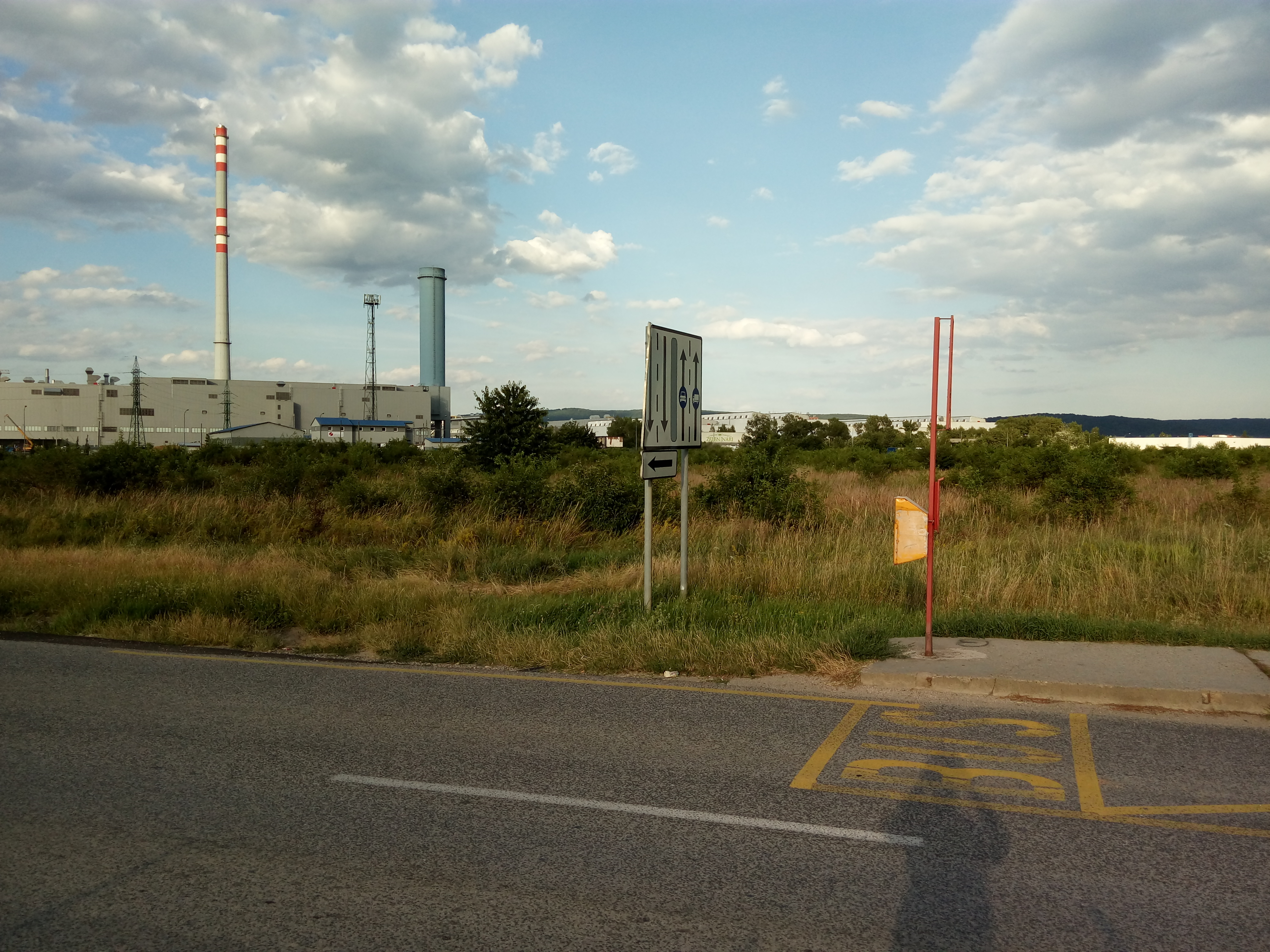 Opletalova, Devínska Nová Ves, Bratislava